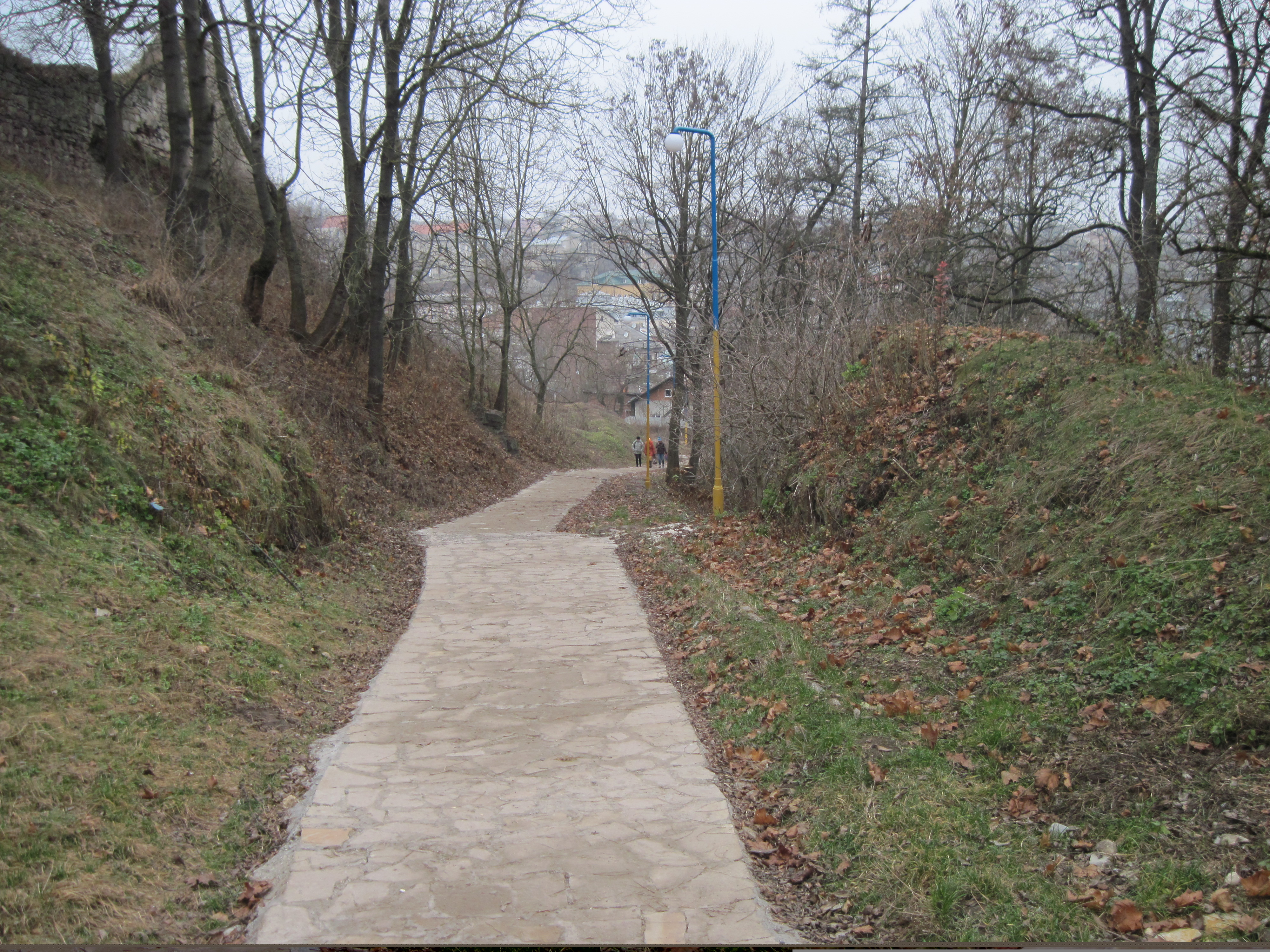 відновлена доріжка біля замку Бучача, листопад 2014